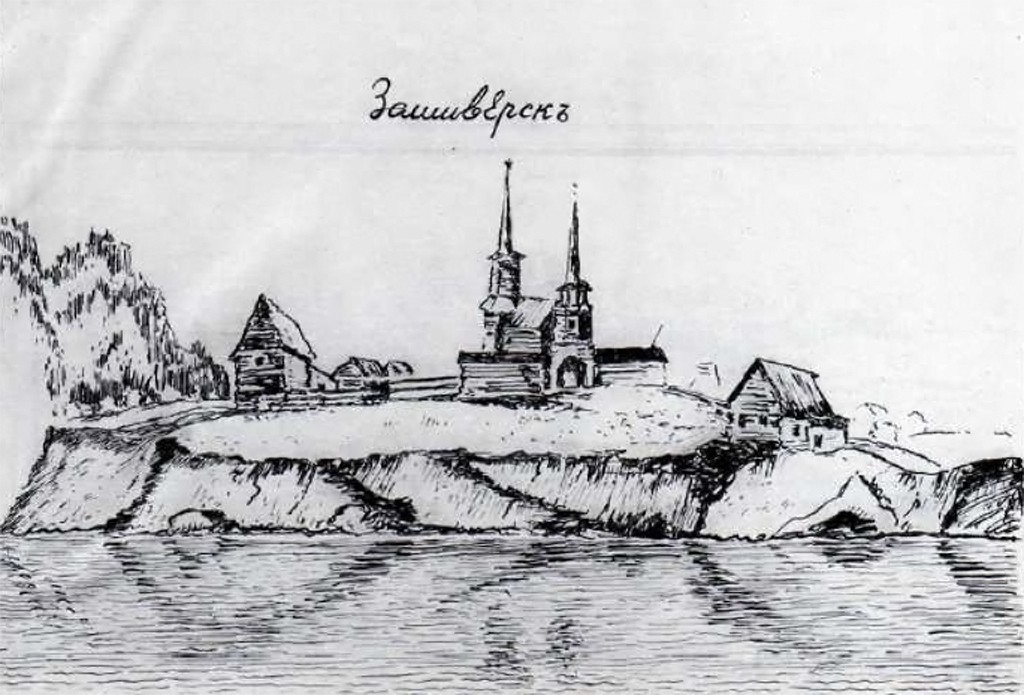 Город Зашиверск. Рисунок Ф.Ф. Матюшкина от 29 ноября 1820 г., сделанный им во время посещения города